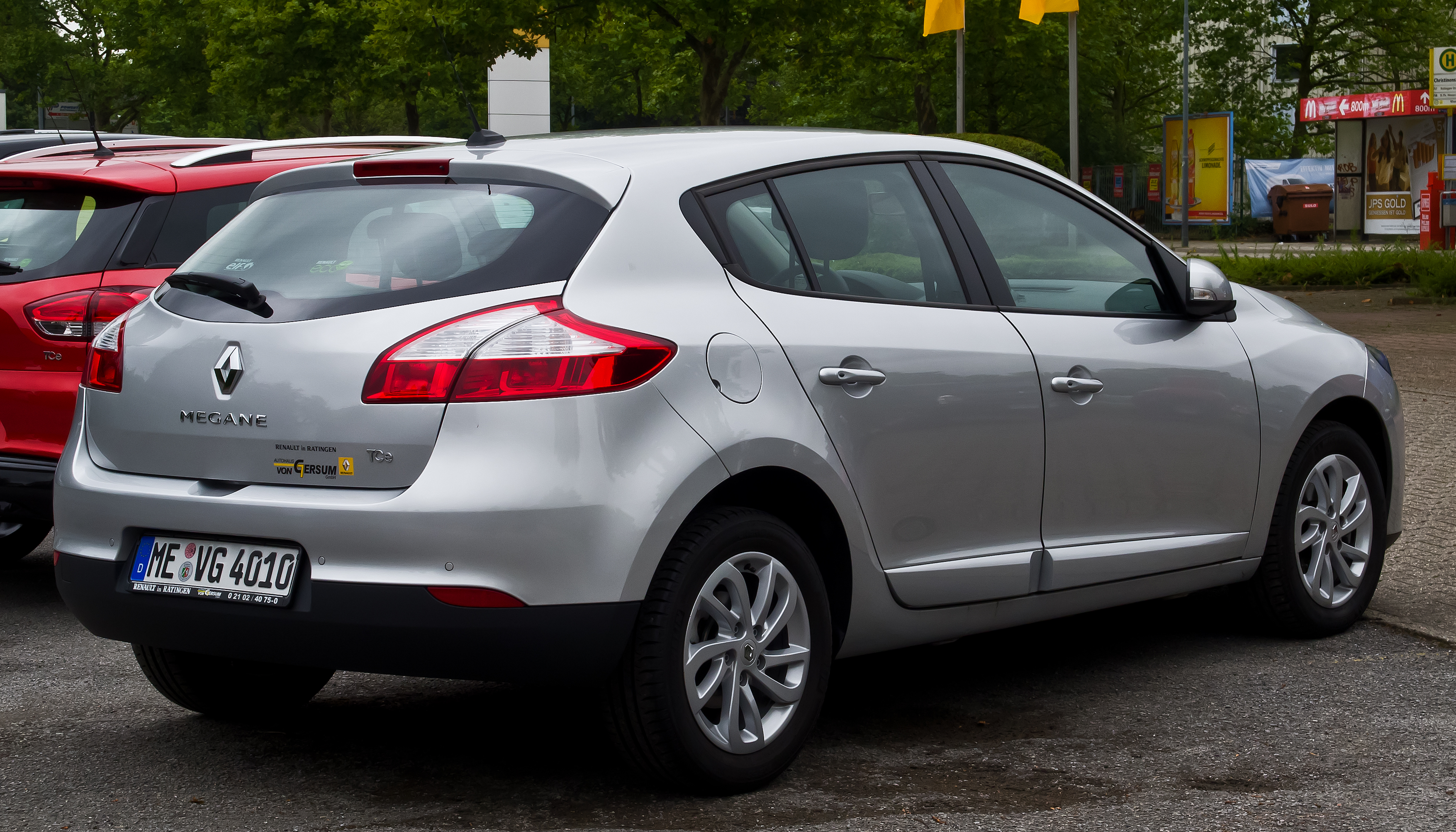 Renault Mégane Paris Deluxe ENERGY TCe 115 Start & Stop eco² (III, 2. Facelift)